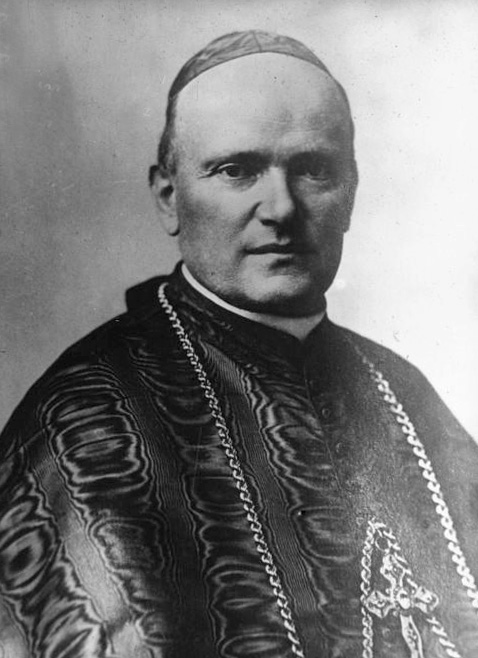 Cardinal Lega (photographie de presse)